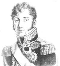 Général_Charles_Montholon